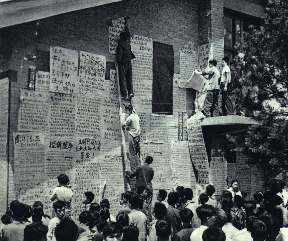 1967-11 1967年 北京大学大字报